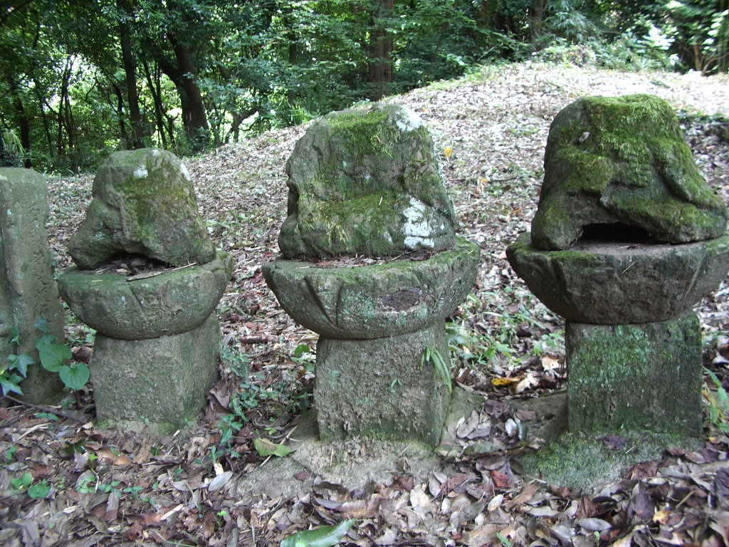 clushed buddha. Kurokawa area, Kawasaki, Kanagawa, Japan